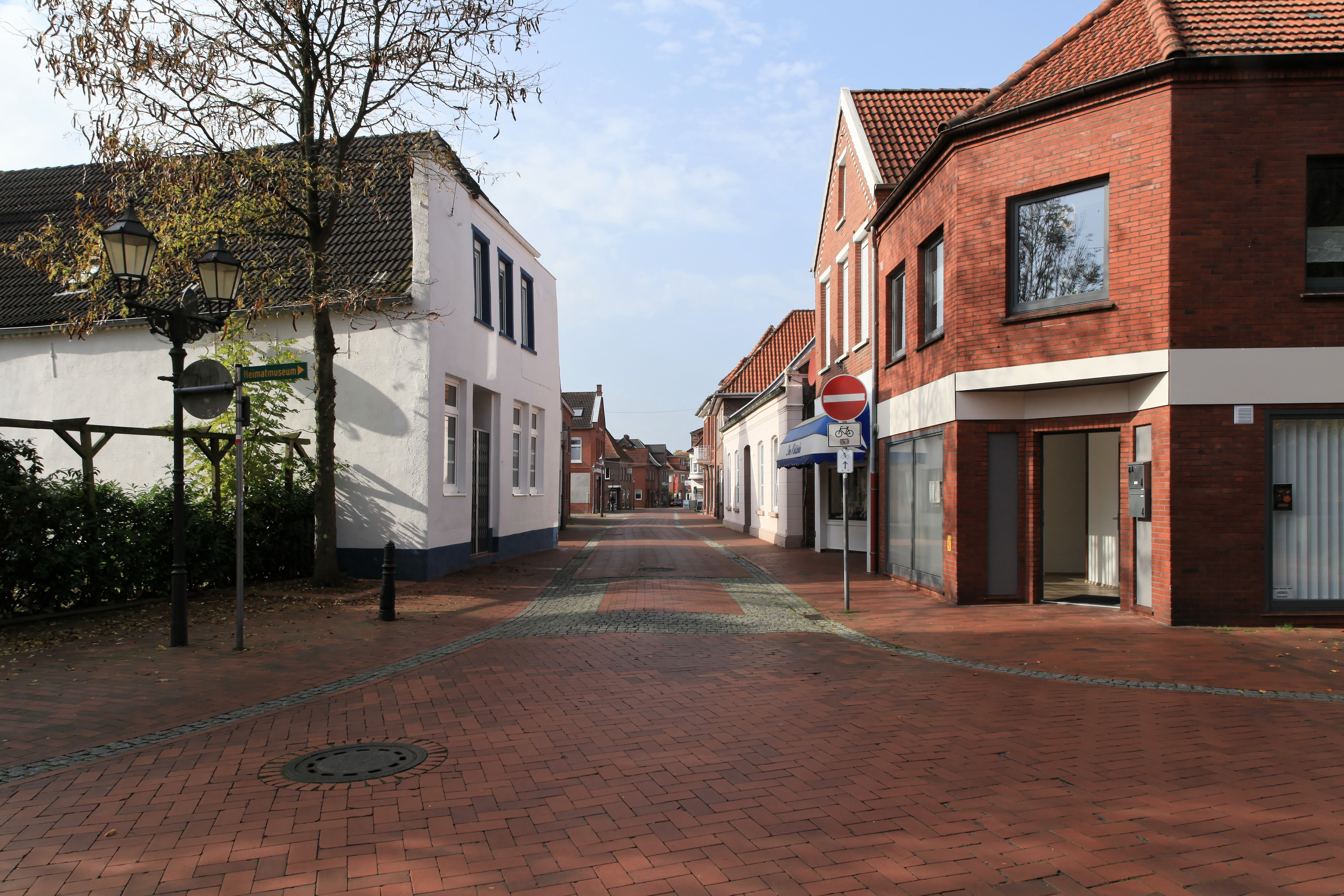 Ecke Westerstraße / Marktstraße in Weener